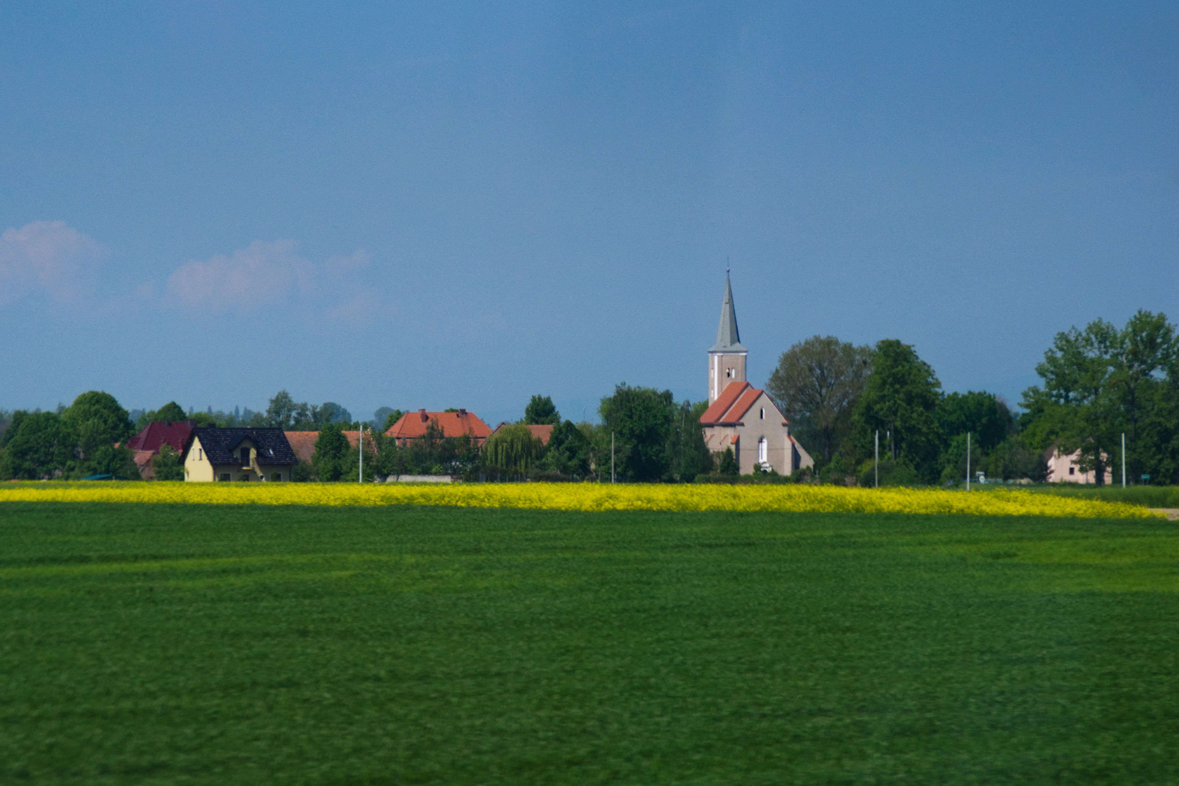 widok na Jaworów (gmina Wiązów), z prawej kościół św. Michała Archanioła, widok z okna autobusu